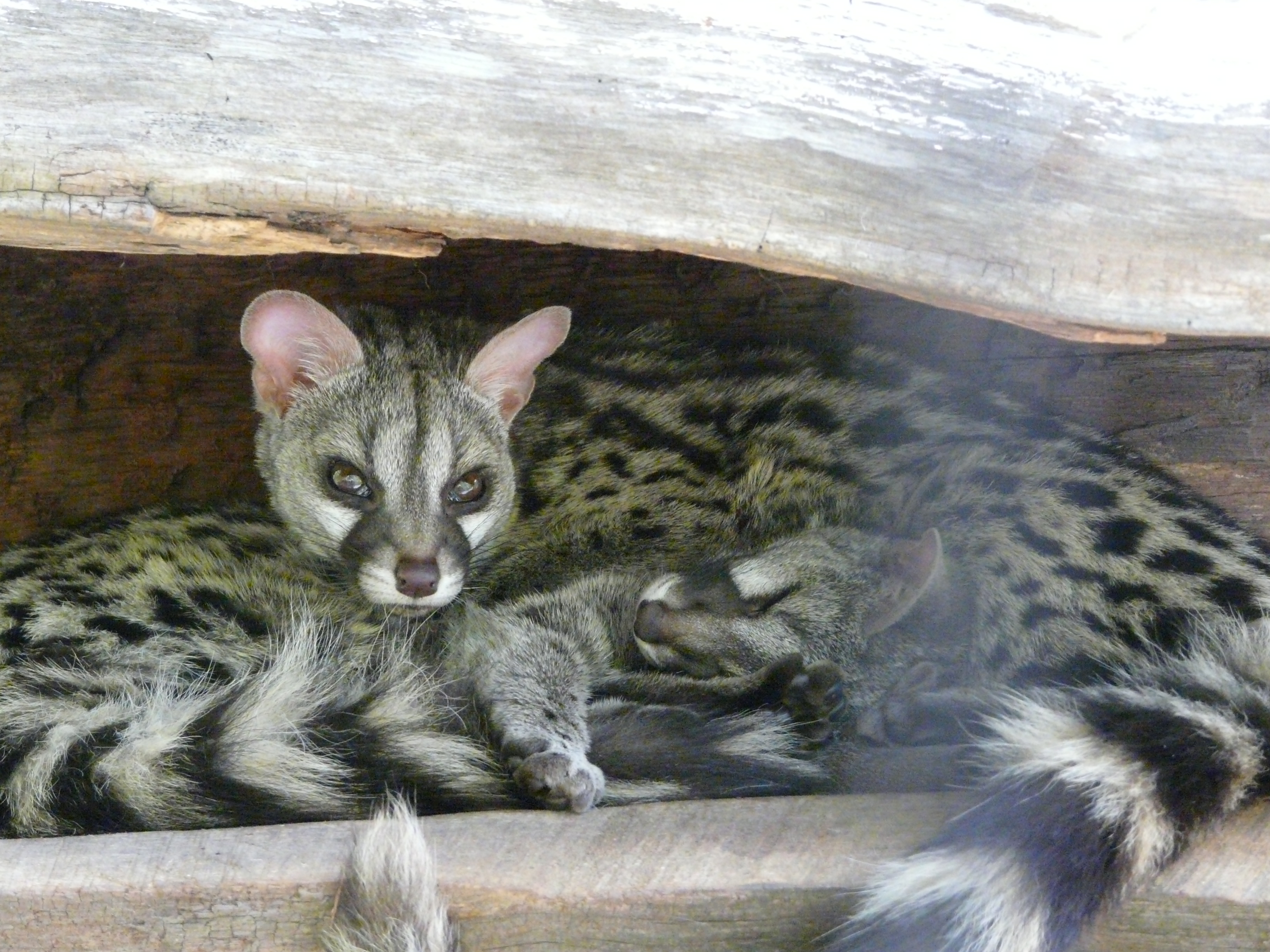 Deux genettes communes (Genetta genetta), parc animalier des Pyrénées, Argelès-Gazost, Hautes-Pyrénées, France.